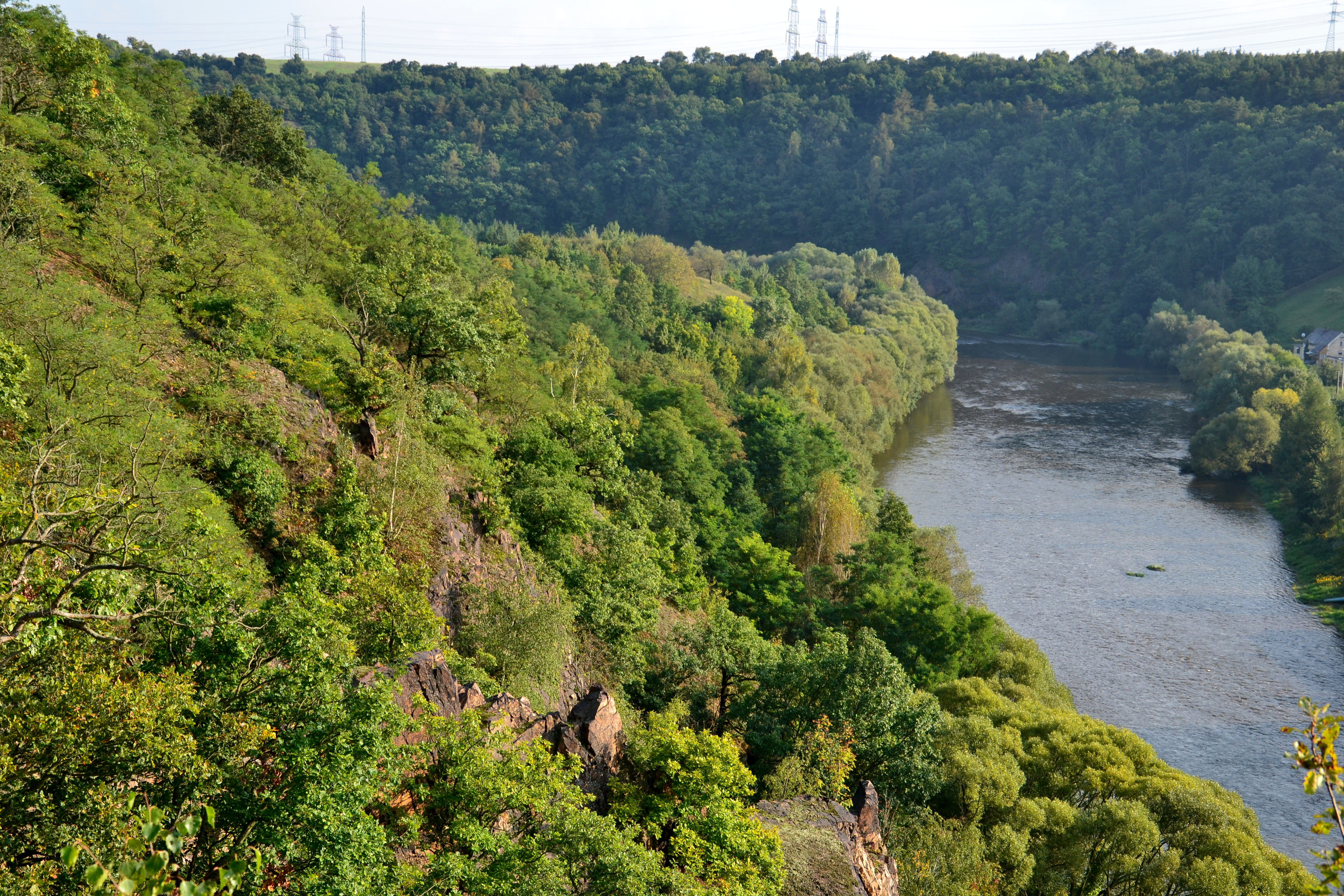 Přírodní památka Želinský meandr - pohled z vyhlídky na levém břehu Ohře nad jezem